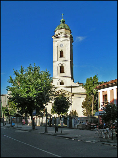 An Orthodox church in Šabac, Serbia/Une église orthodoxe à Šabac, une des villes principales de Serbie